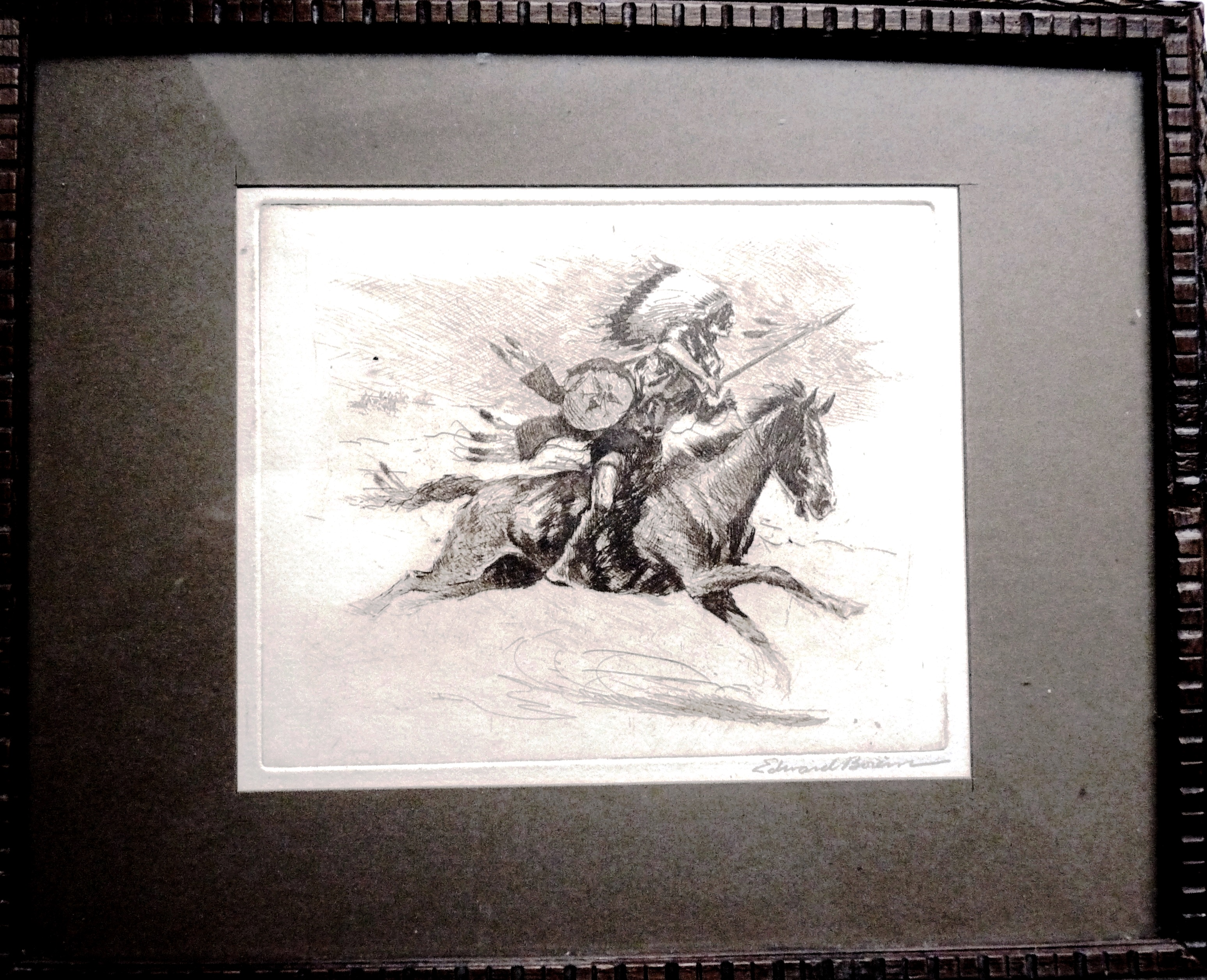 etching by John Edward Borein (American, 1872 to 1945). Charging Hawk, circa 1920. Signed in pencil, lower right. A superb, dark impression with inky plate edges